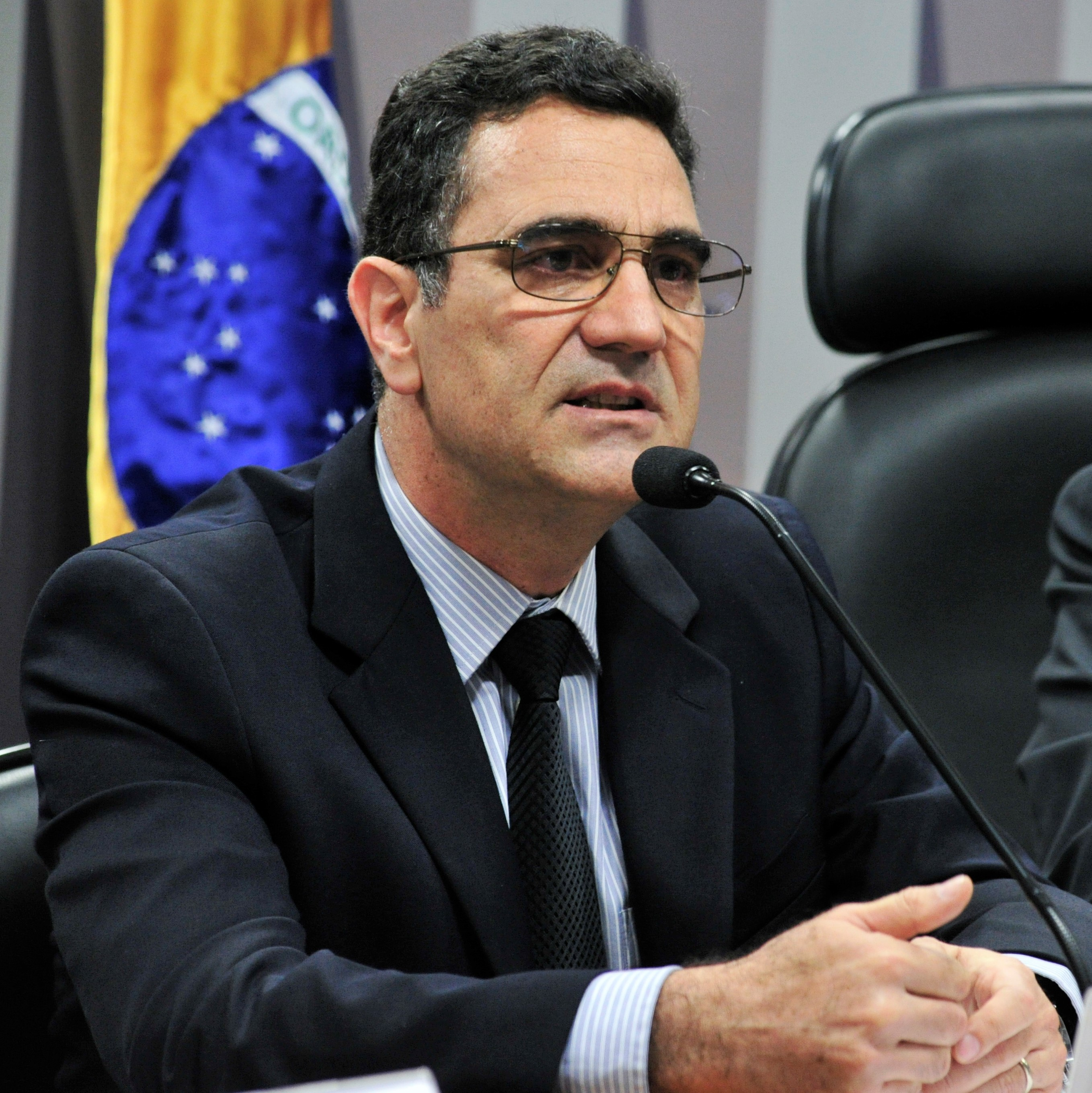 Comissão de Educação, Cultura e Esporte (CE) realiza audiência interativa para debater liberdade de expressão na sala de aula. Em pronunciamento, coordenador do movimento Escola Sem Partido, Miguel Nagib. Foto: Geraldo Magela/Agência Senado